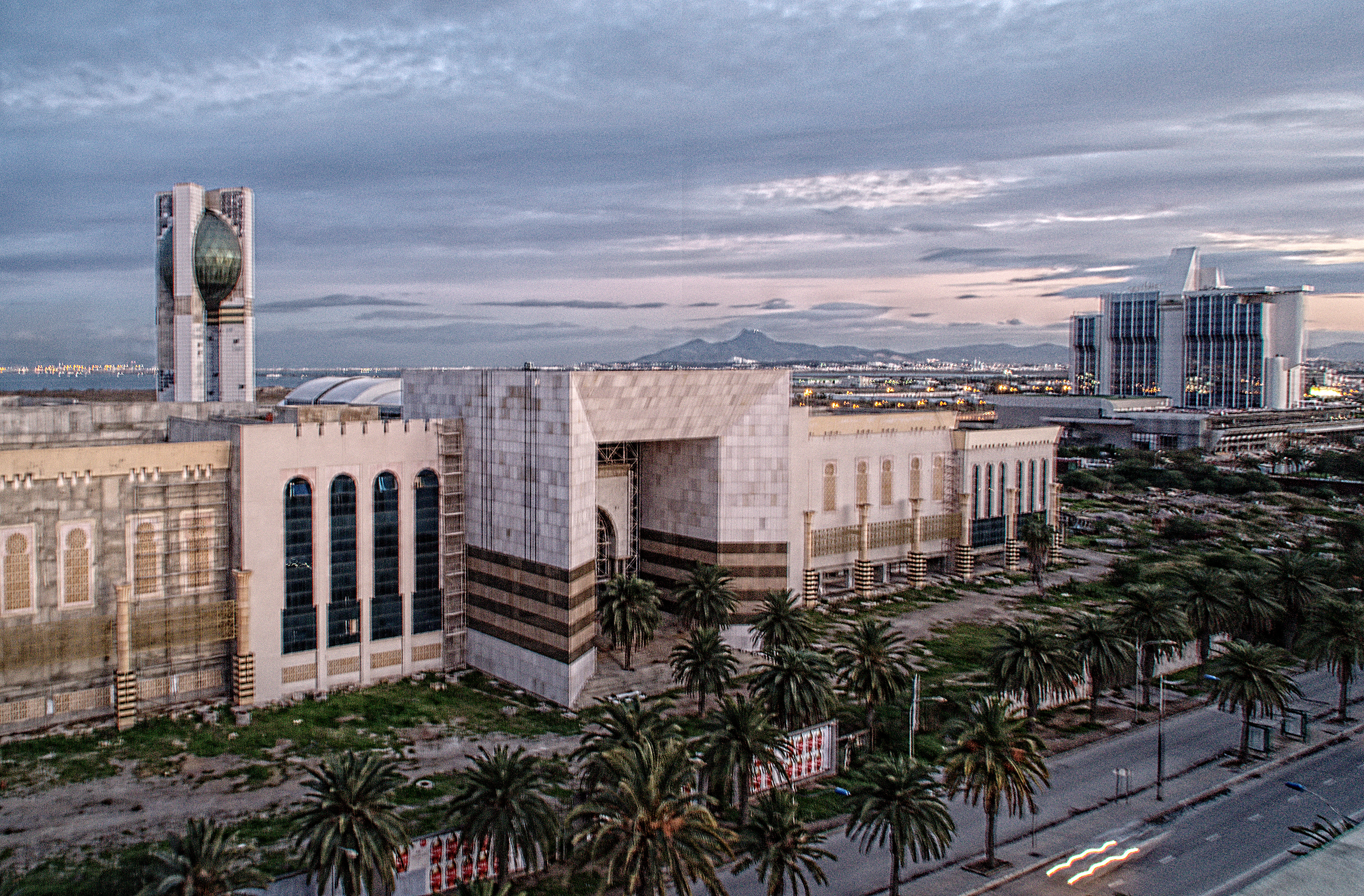 Cité de la culture de Tunis